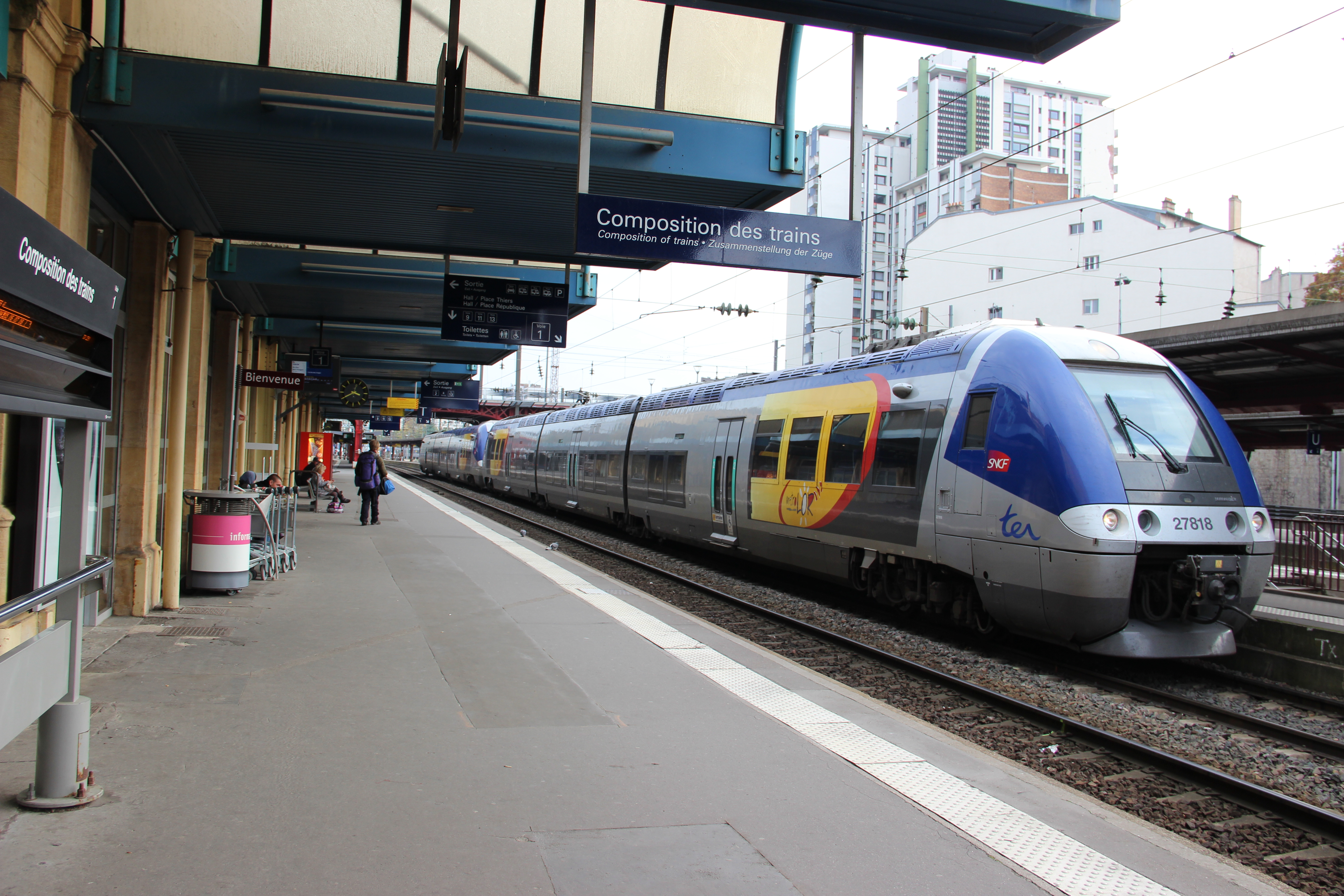 TER Métrolor en gare de Nancy